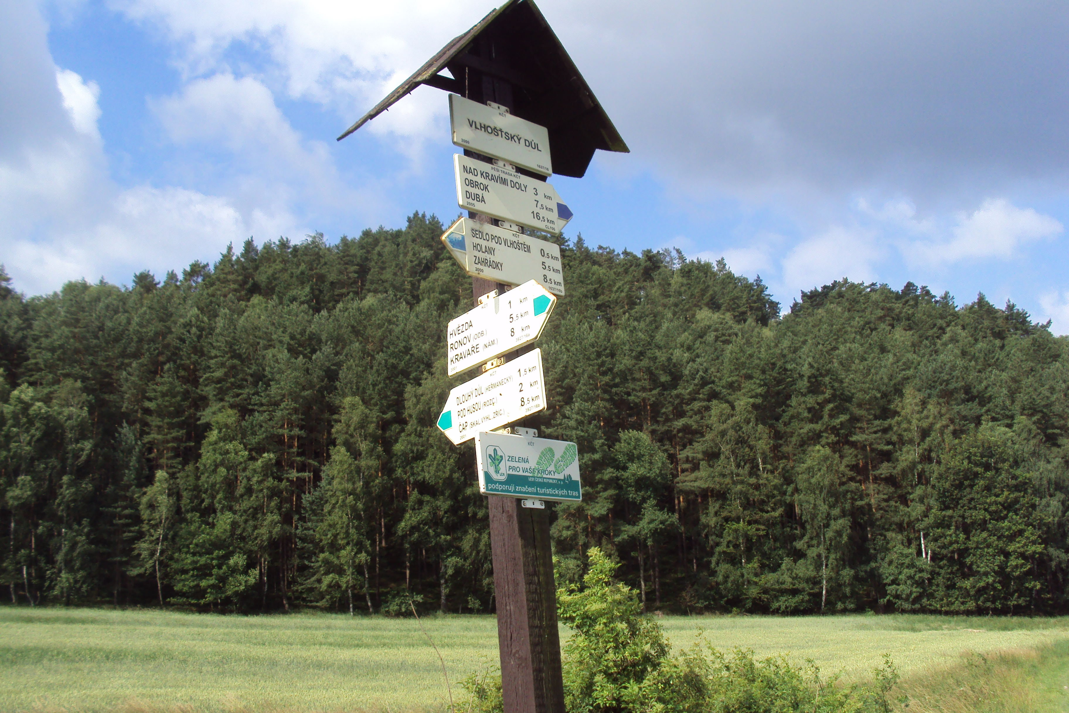 Turistický rozcestník u kopce Vlhošť na Kokořínsku